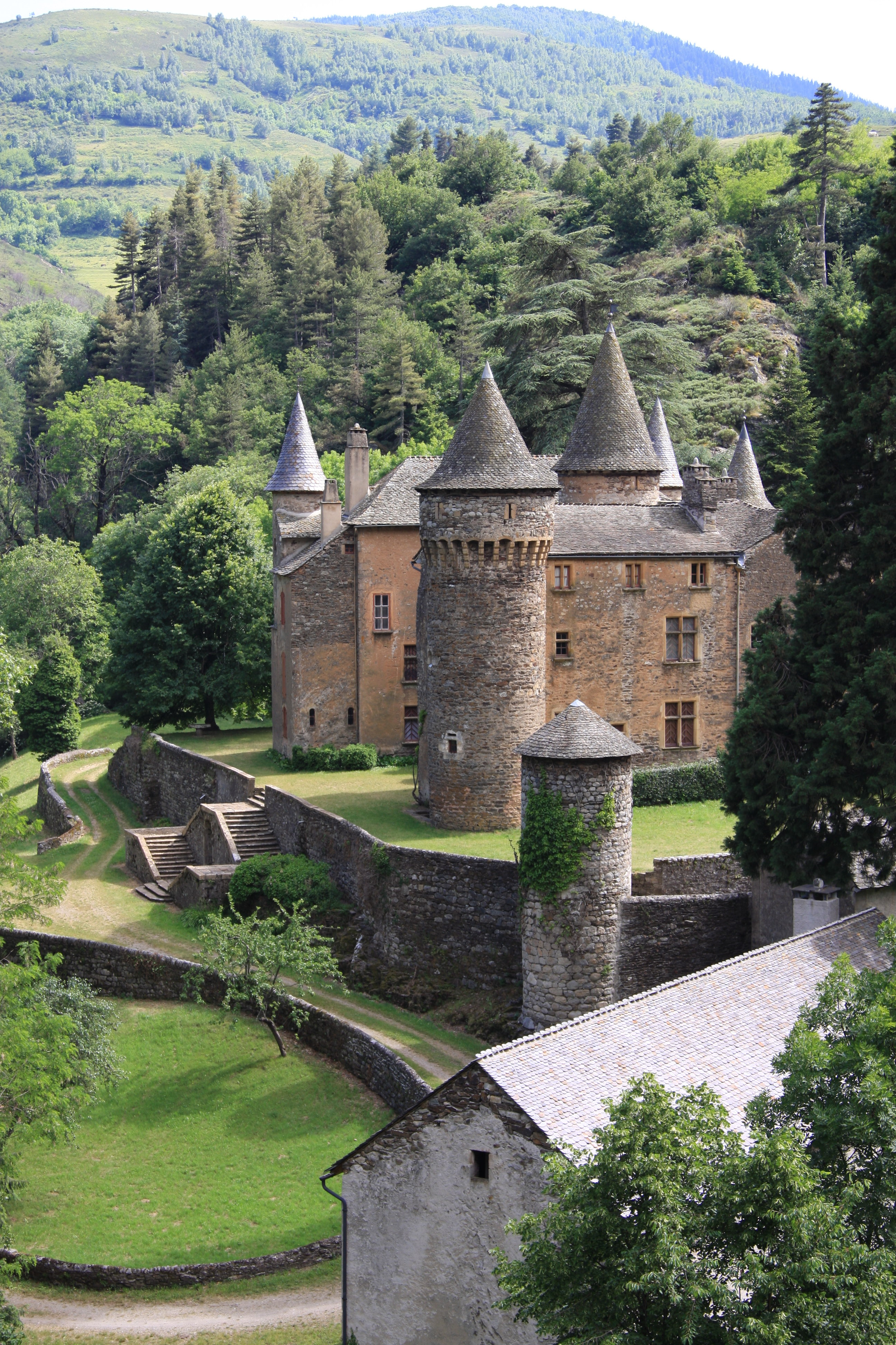 Le château du Champ à Altier en Lozère (France)